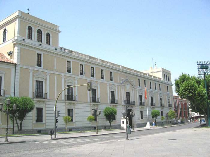 Valladolid – España (Spain) - Palacio Real: Fue construido en 1526 por el arquitecto Luis de Vega. El mismo arquitecto realizó su ampliación en 1534. En 1600 fue adquirido por el Duque de Lerma, quien luego se lo vendió a Felipe III.